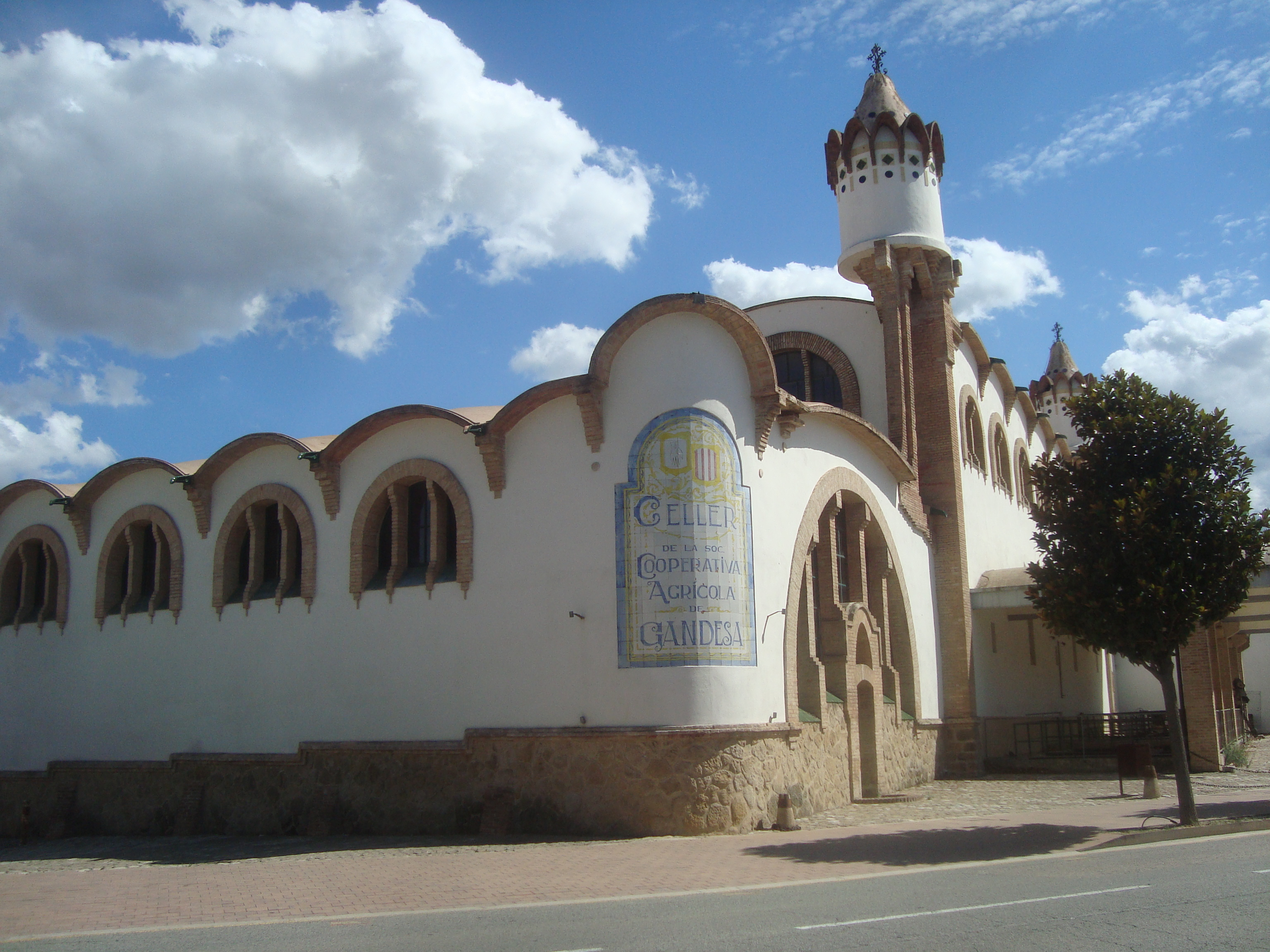 Celler Cooperatiu (Gandesa)